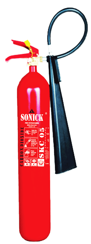 Alat pemadam Api co2 Sonick